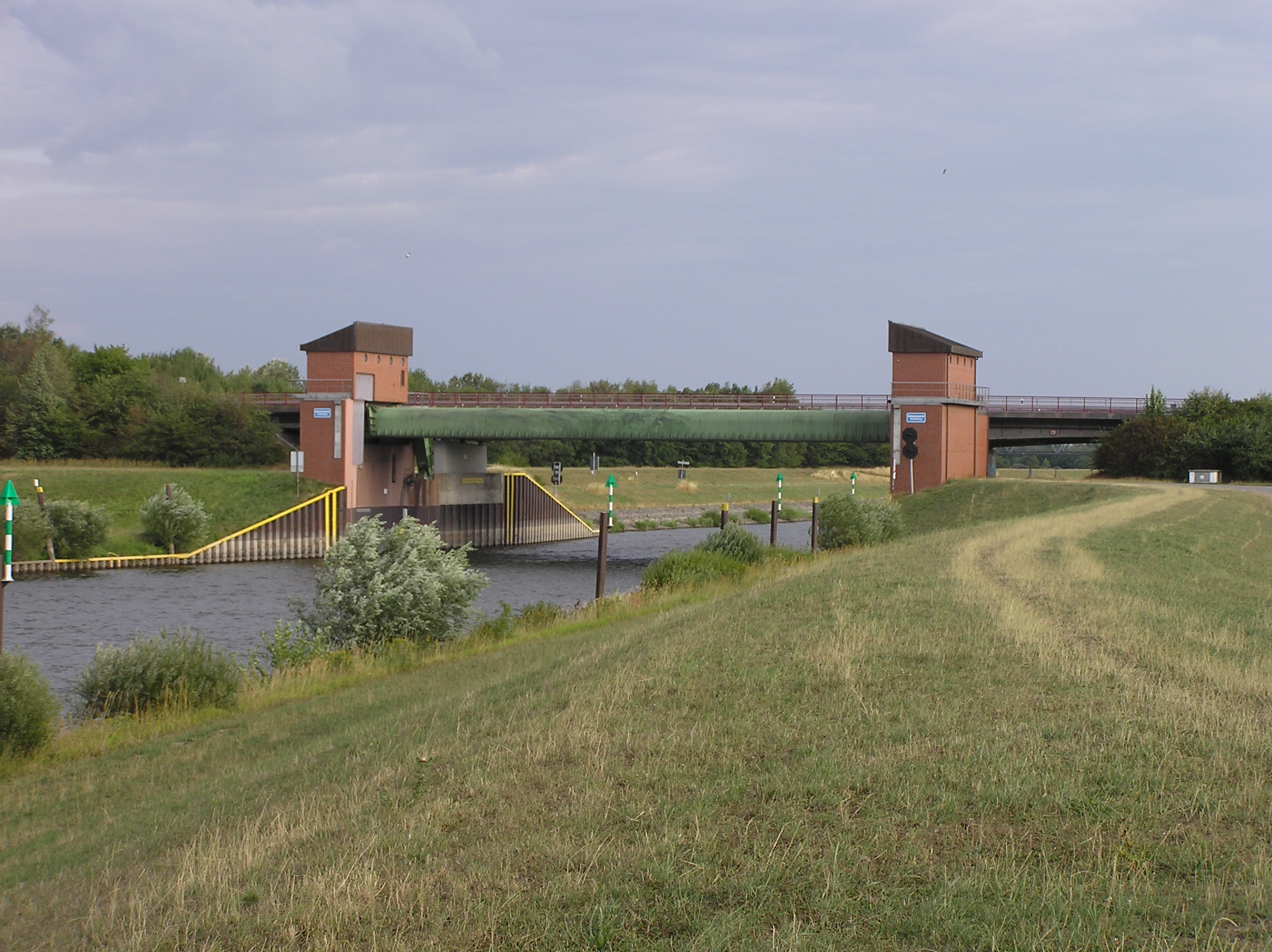 Sicherheitstor (Elbesperrtor) im Elbe-Seitenkanal bei Artlenburg/B209